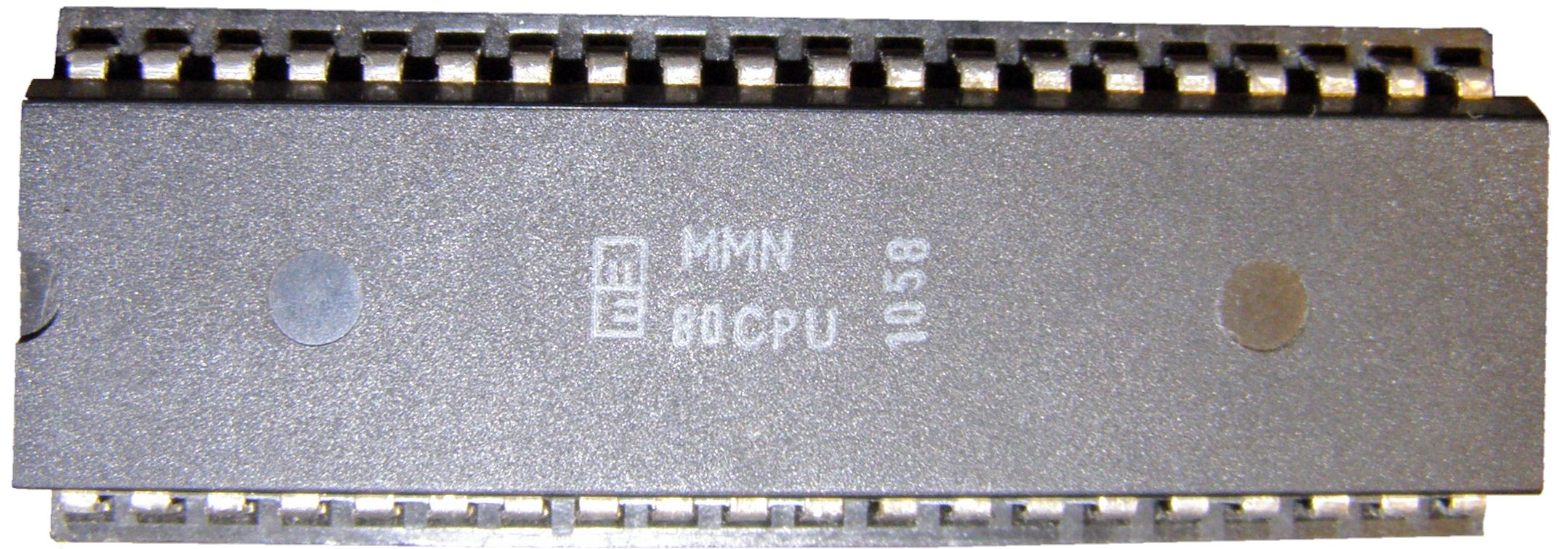 MMN80CPU, 8 bit μP made in Romania